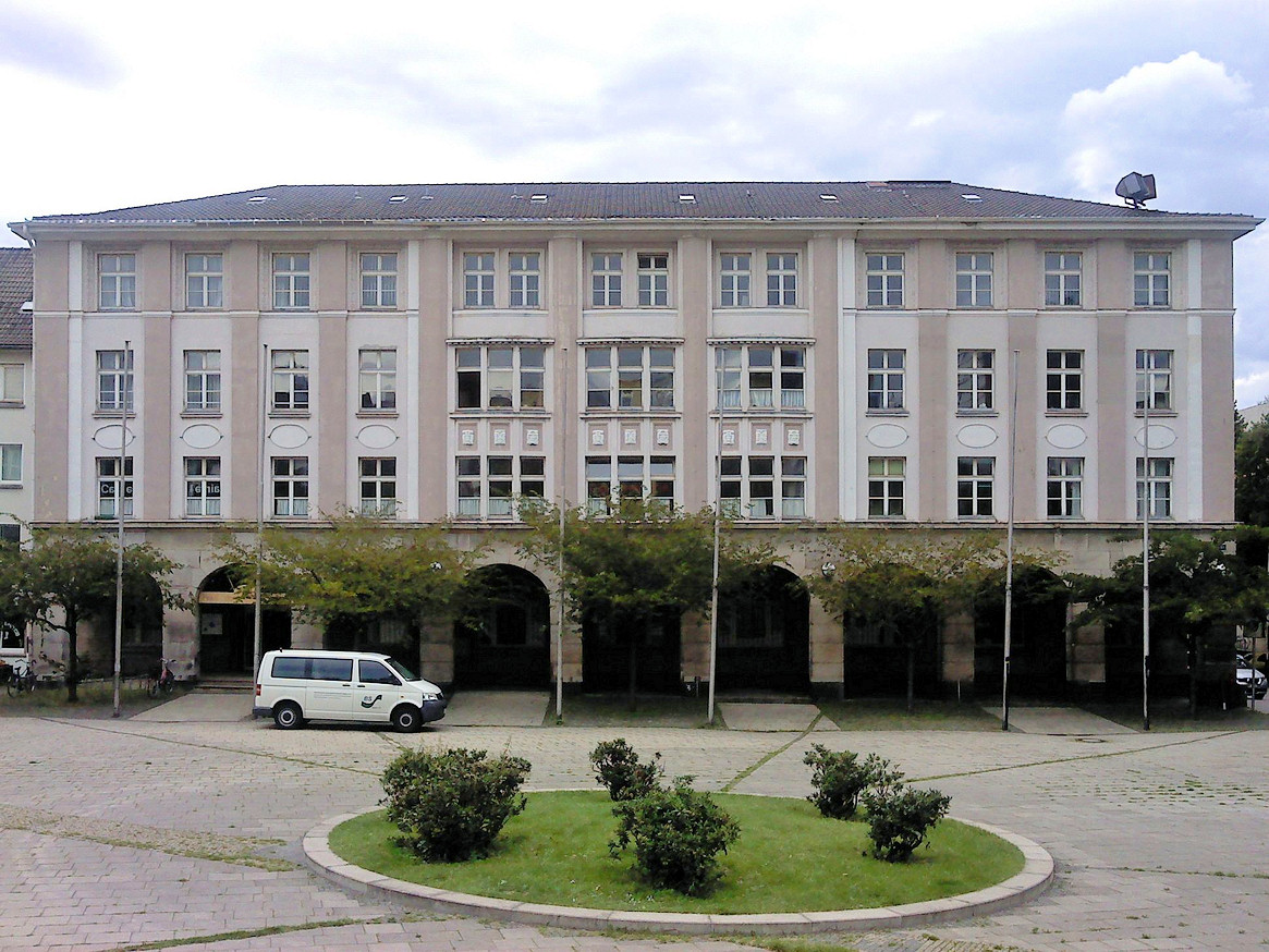 ehem. Kaiser-Wilhelm-Ledigenheim in Essen-Mitte, Architekt: Oskar Kunhenn